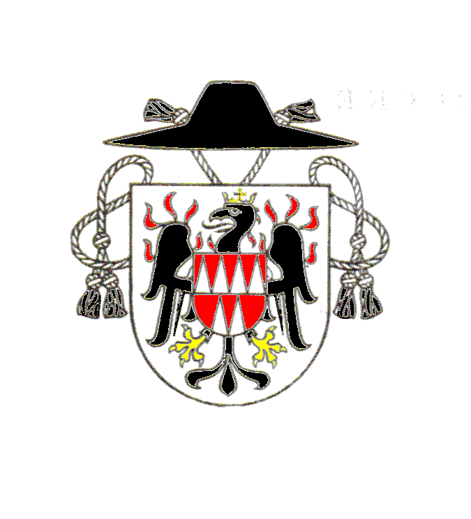 Znak děkanátu Olomouc v Olomoucké arcidiecézi